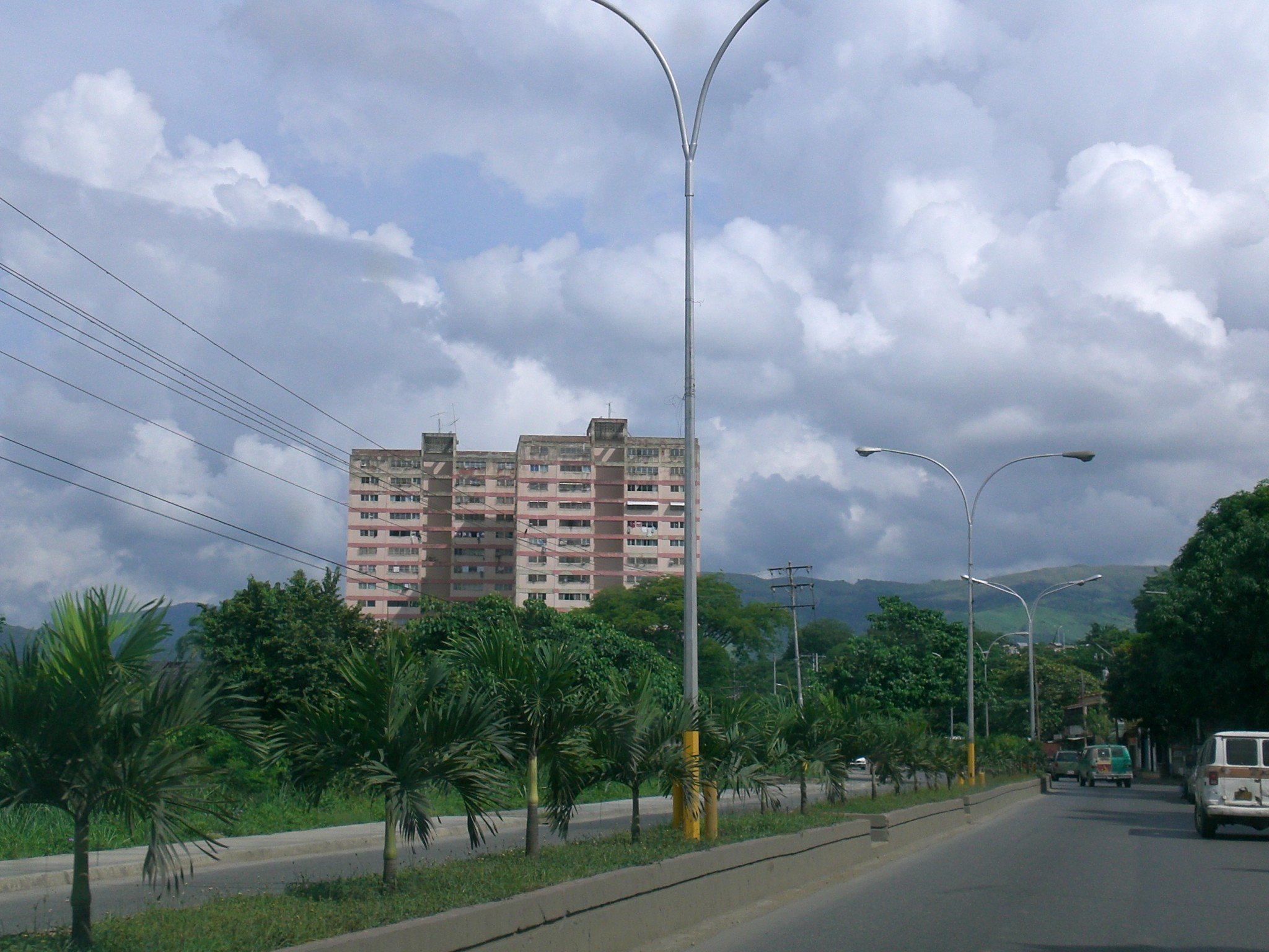 Perimetral Avenue, Cúa, Venezuela